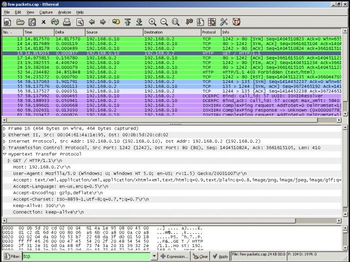 Wireshark ekran görüntüsü